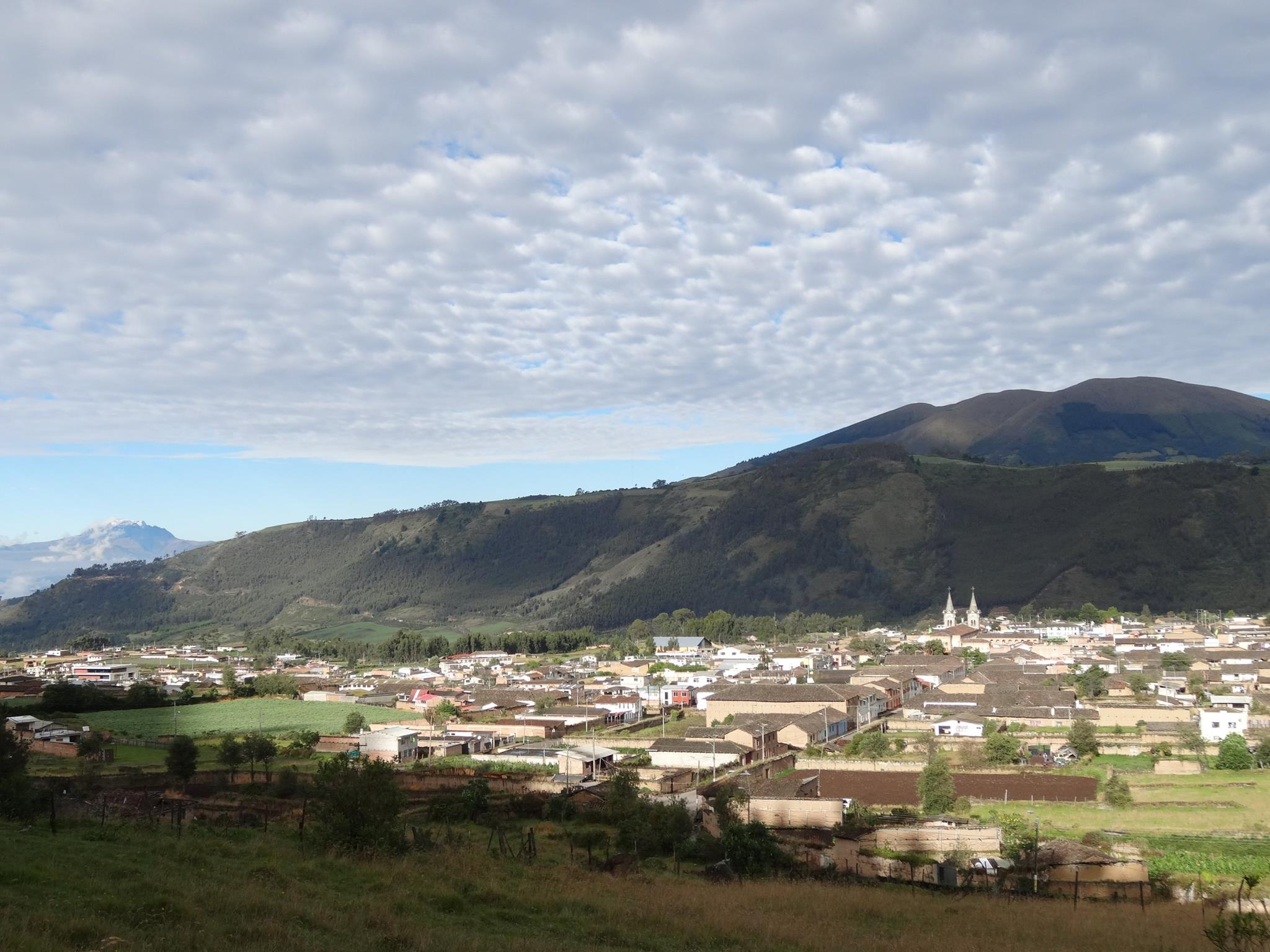 Ciudad de El Ángel